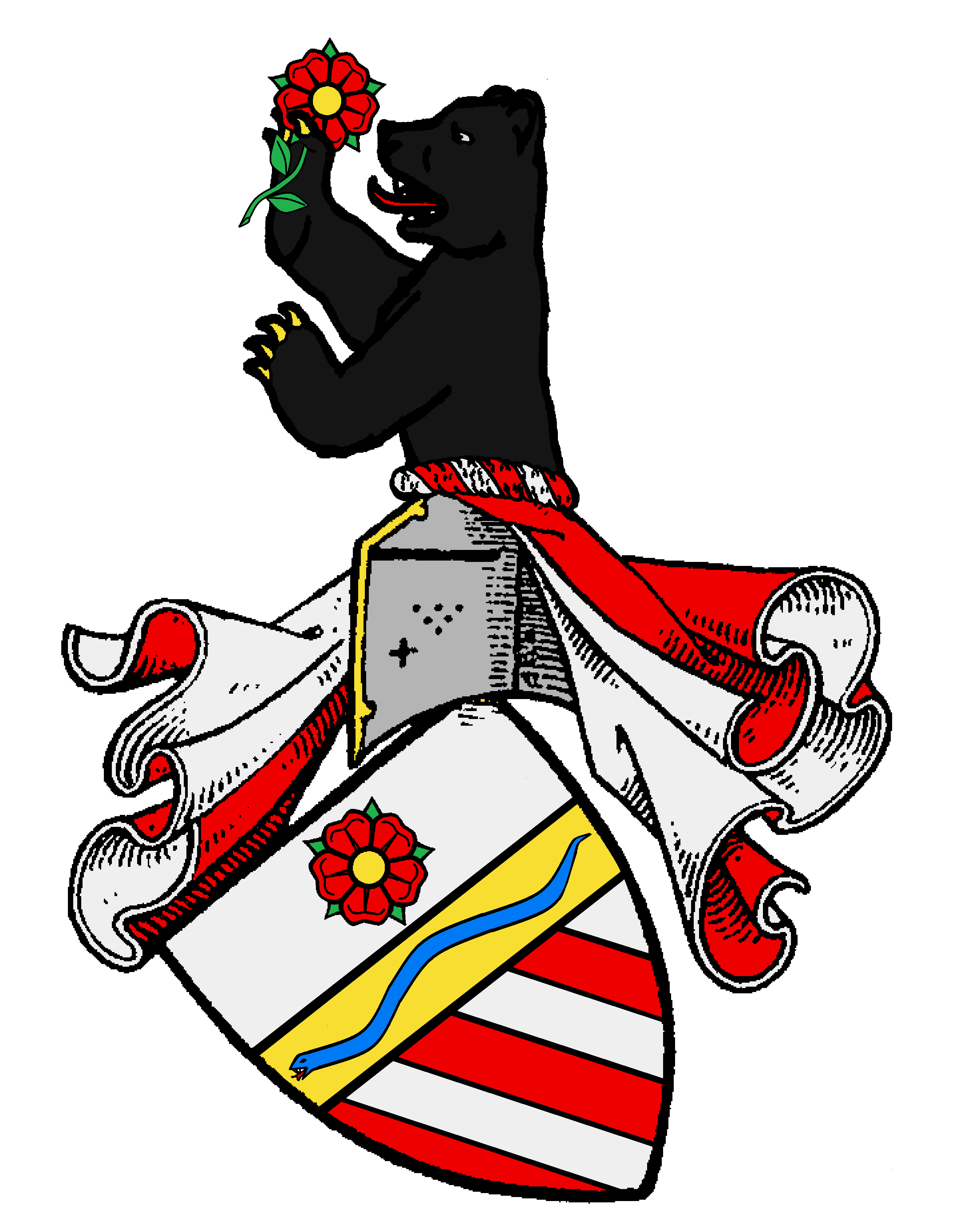 Stammwappen der Orsini, altes römisches Patriziergeschlecht, seit 1625 Fürsten des Heiligen Römischen Reiches deutscher Nation